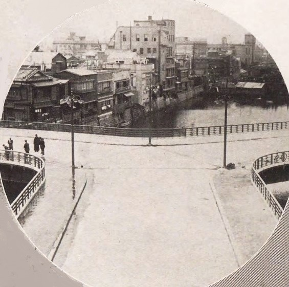 三吉橋 1920年代末